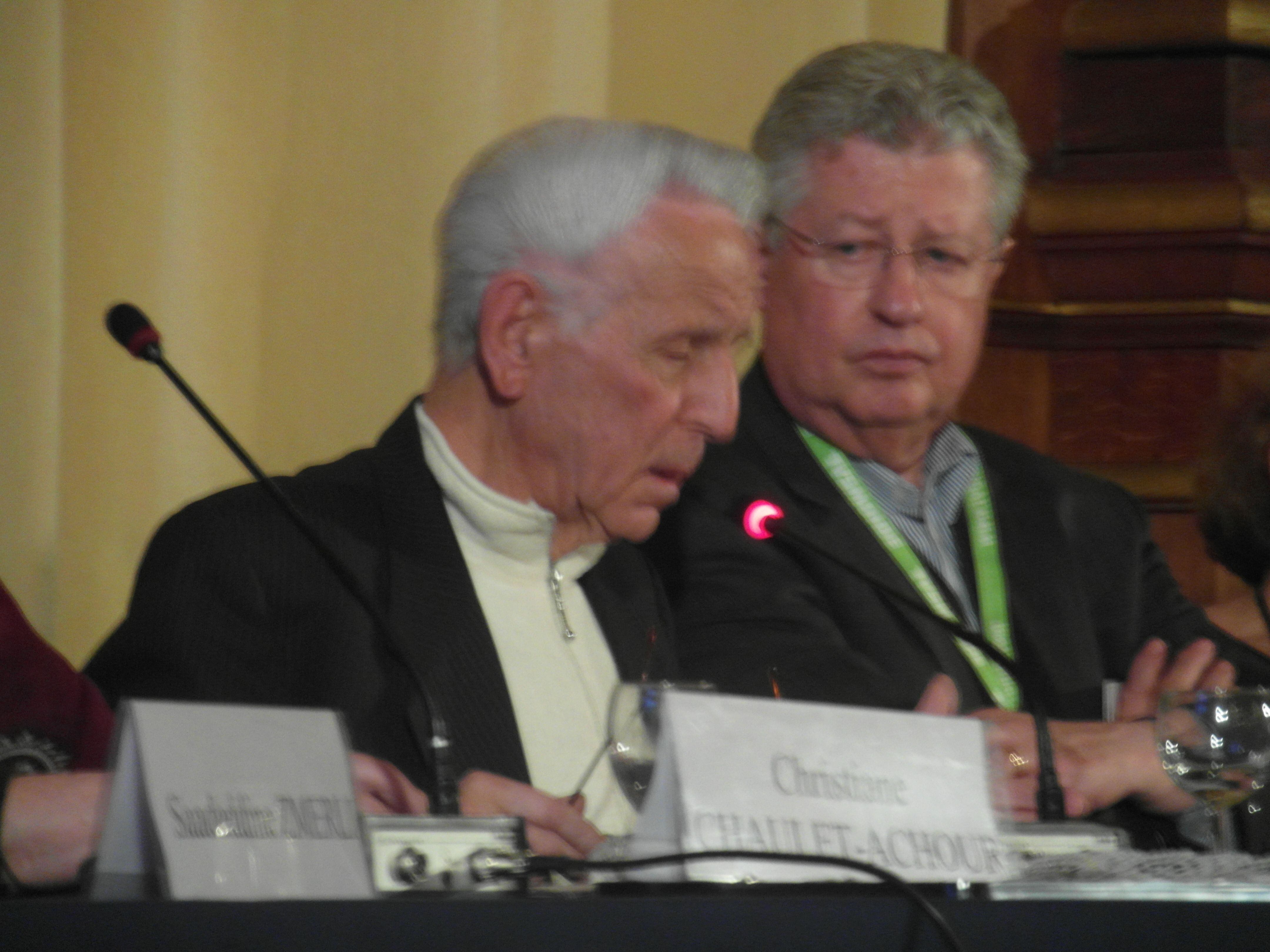 Ali Haroun (19e Maghreb des Livres, Paris, 16 fév. 2013)